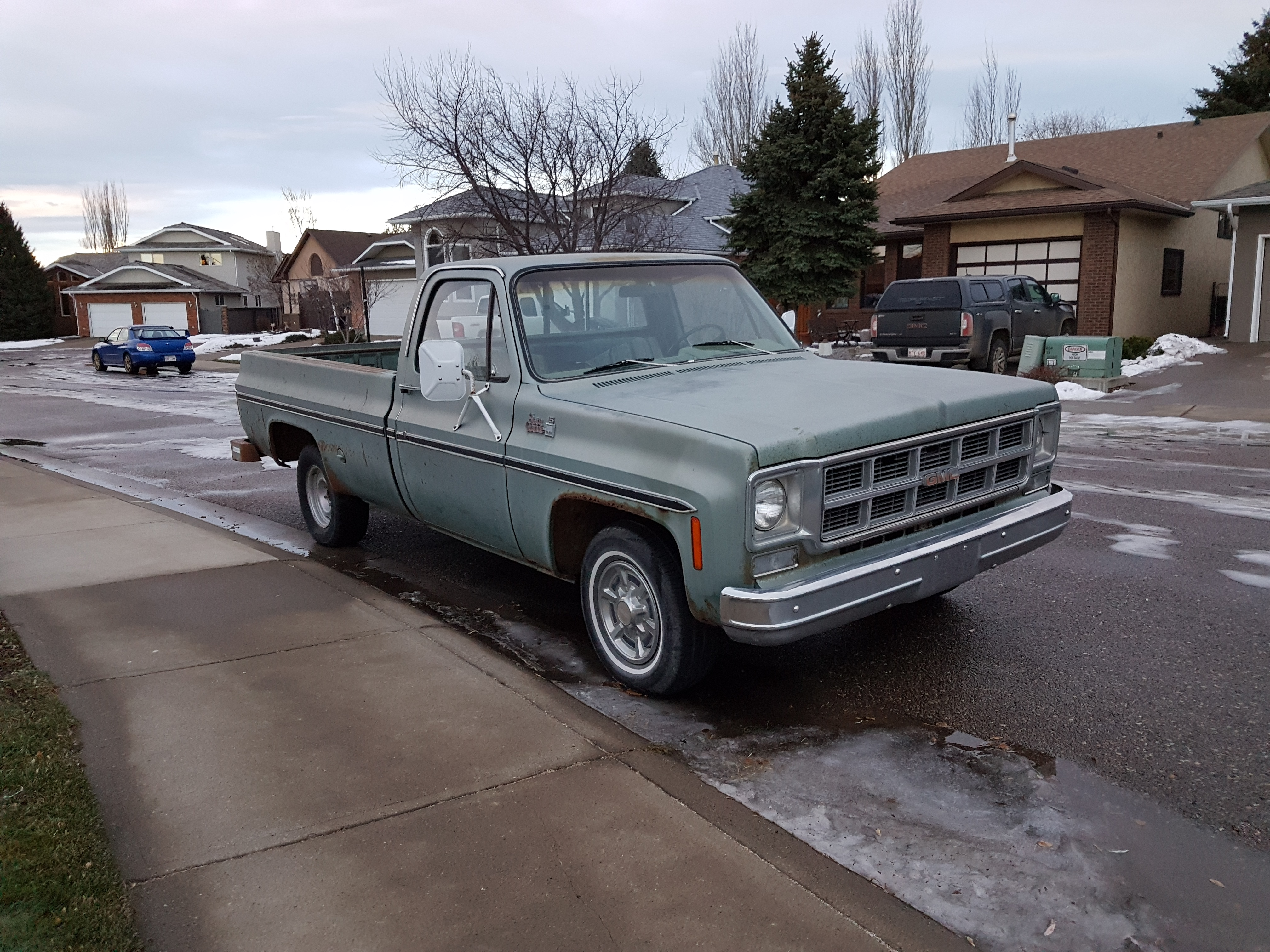 70s era GMC truck